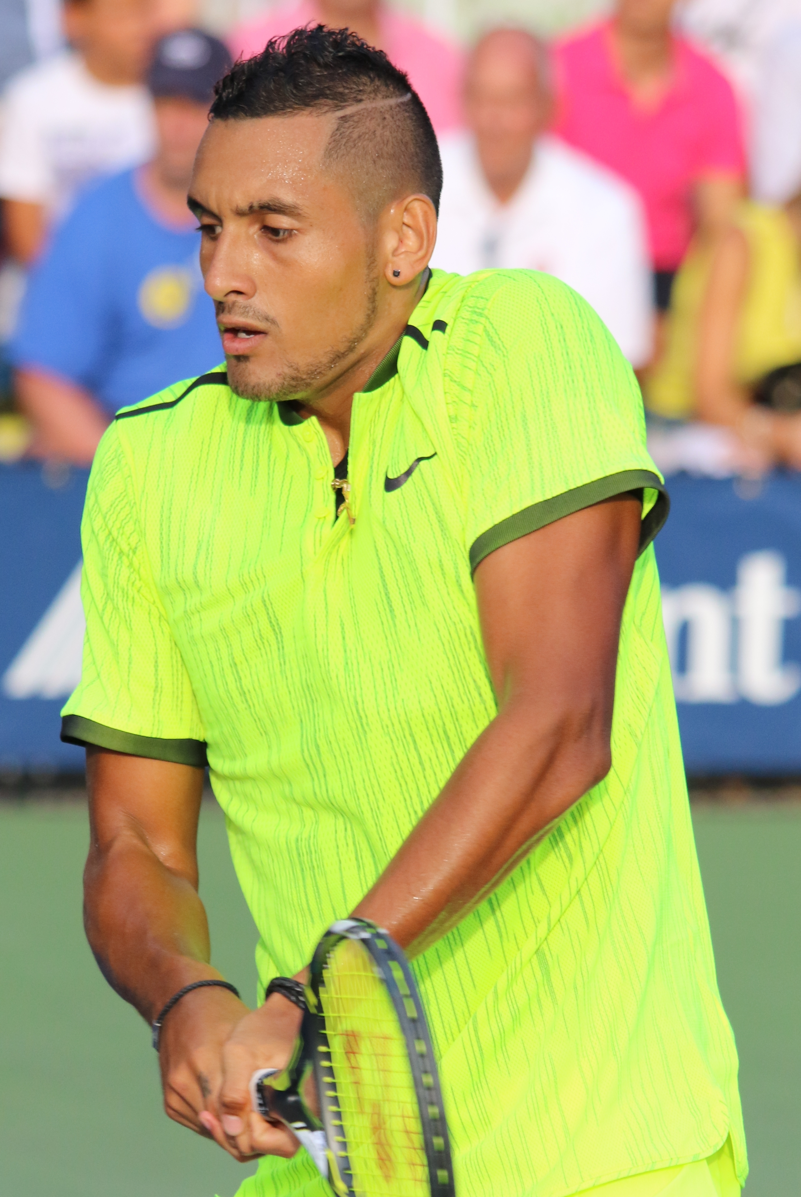 Kyrgios US16 (42)